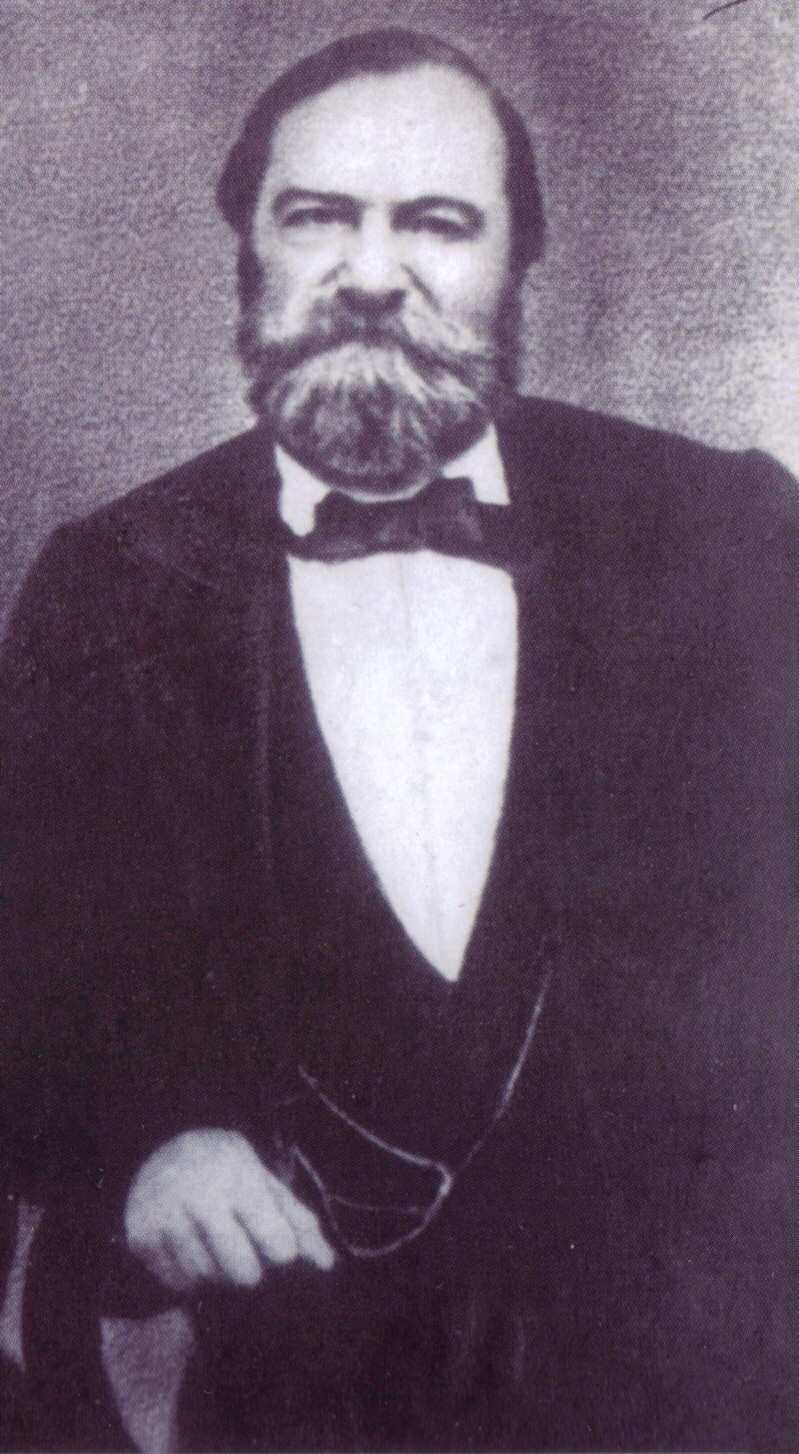 Diego Eugenio Lamas (1810-1868).